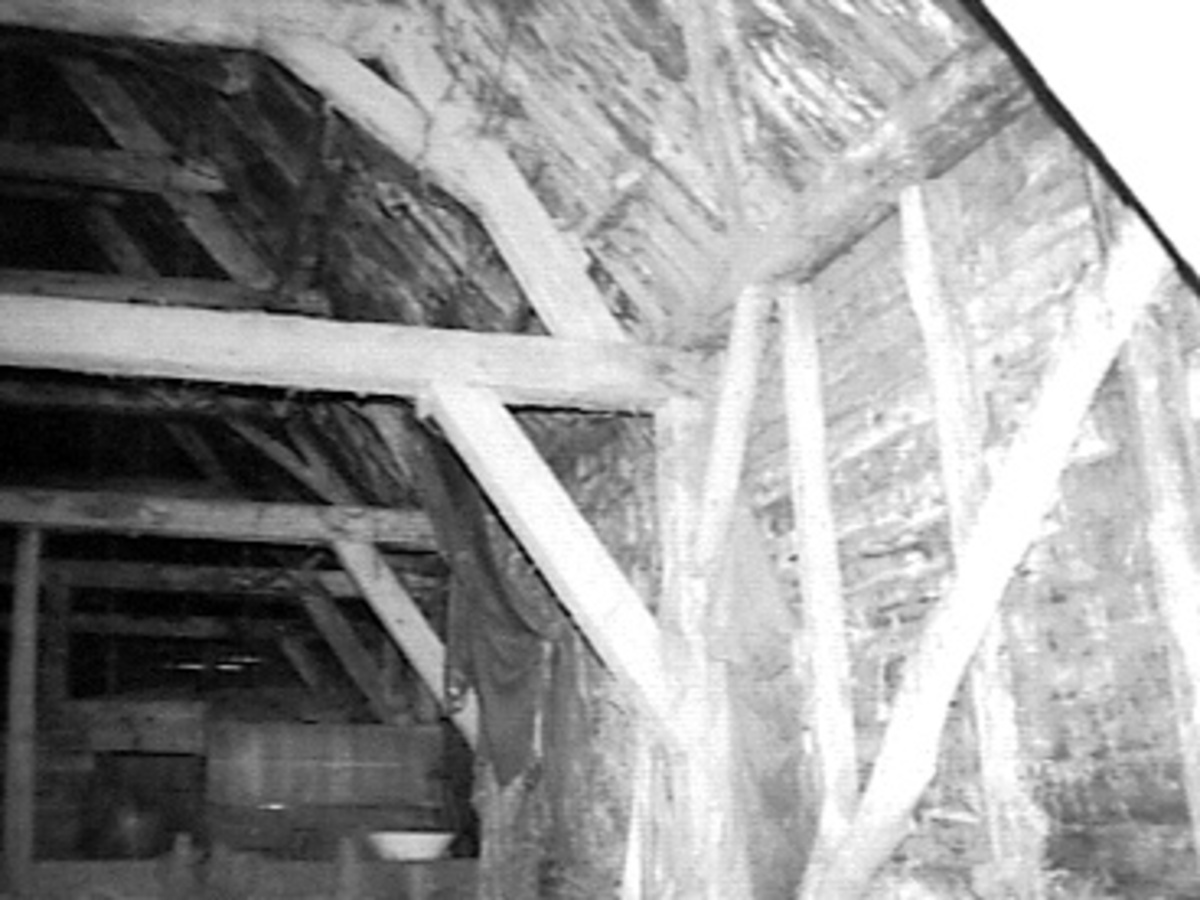 Ridderstee: binnenzijde stalwand (opmerking: Deze afbeelding hebben wij helaas alleen in deze lage resolutie.)